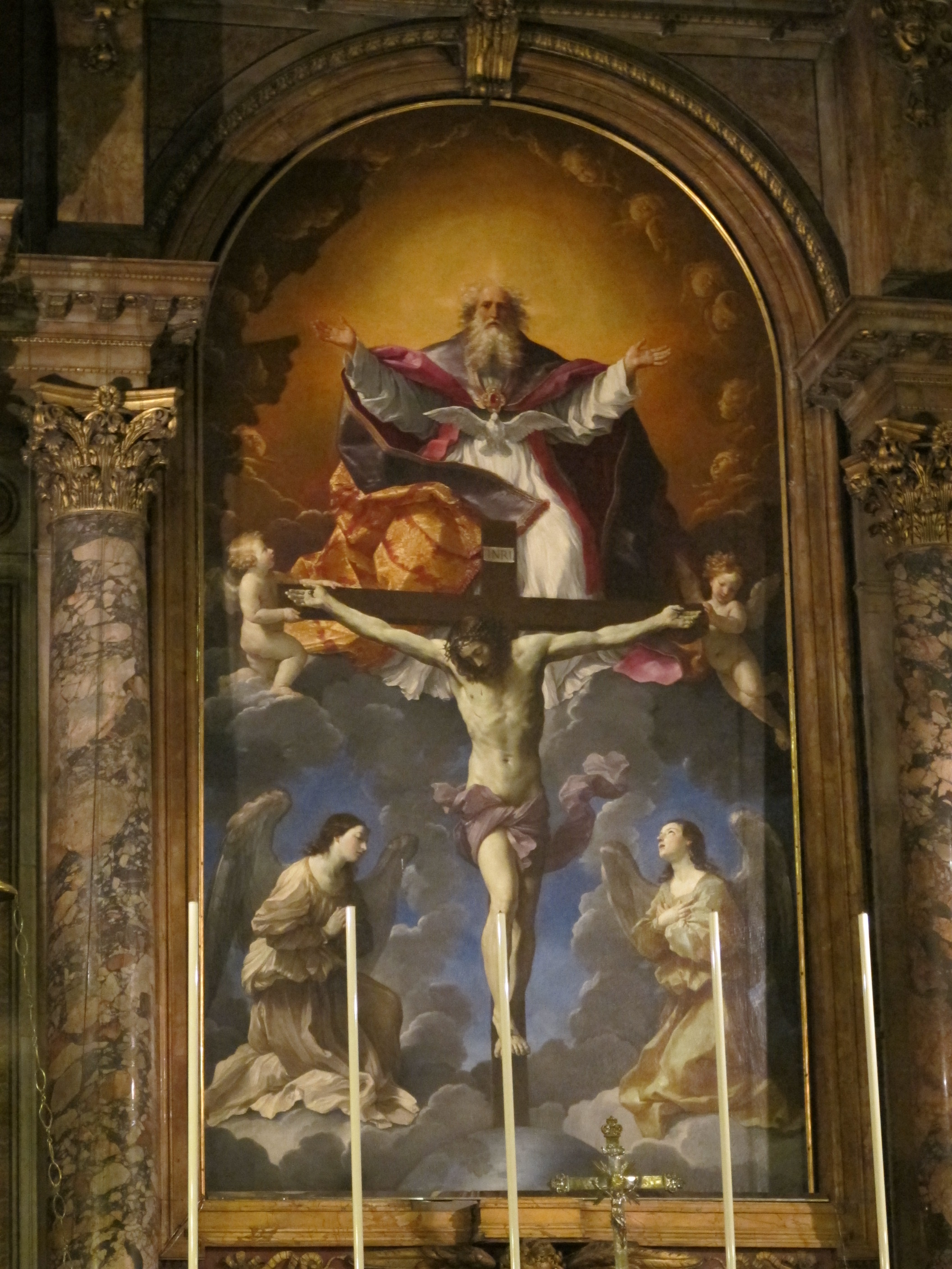 Trinità dei pellegrini, altare di guido reni